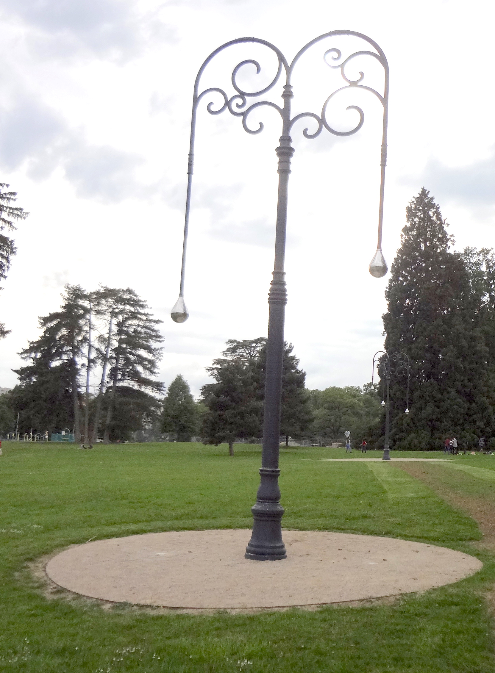 Monument « Les Réverbères de la Mémoire », de Melik Ohanian, au parc Trembley.